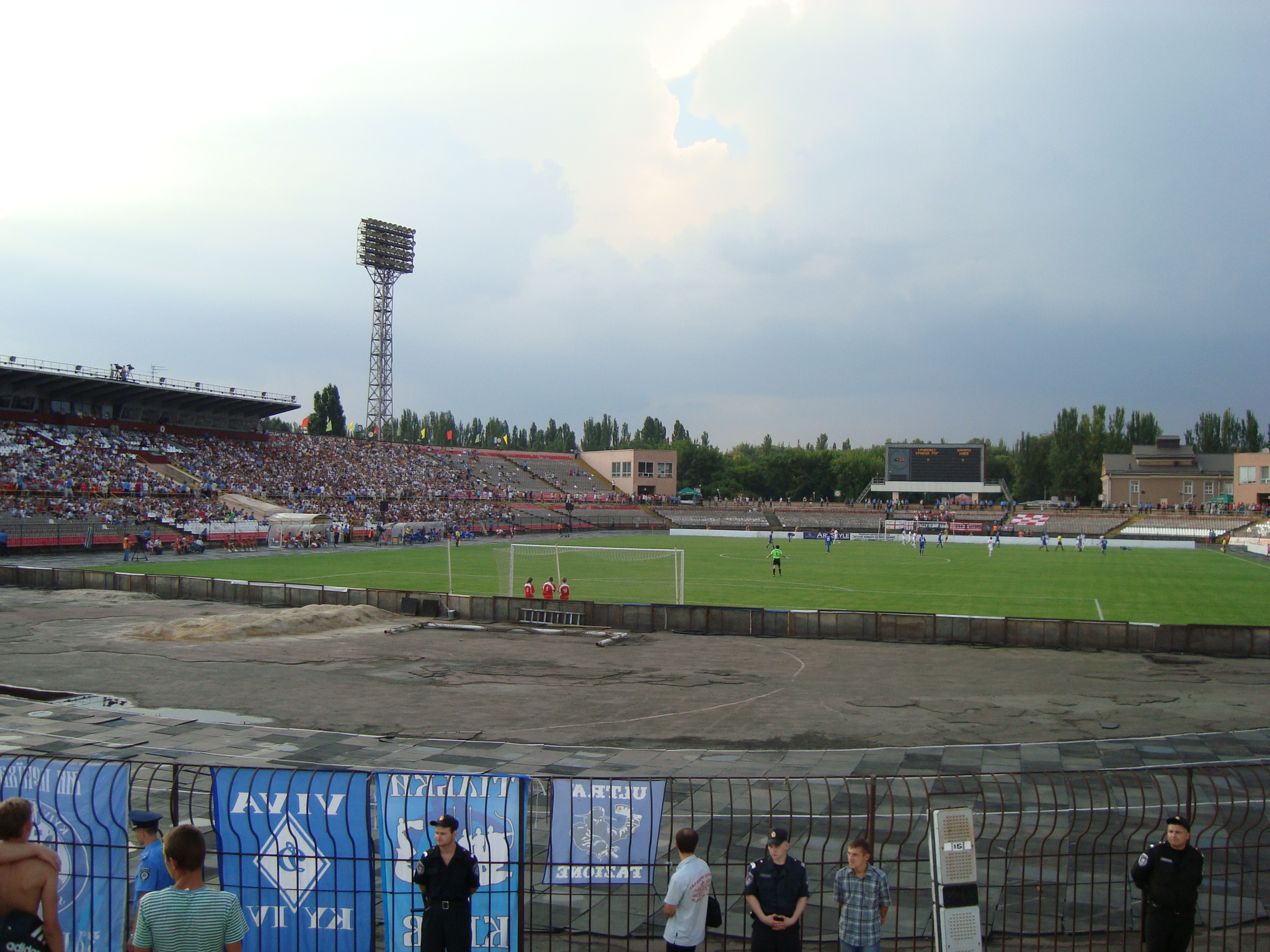 Стадіон «Металург» у Кривому Розі